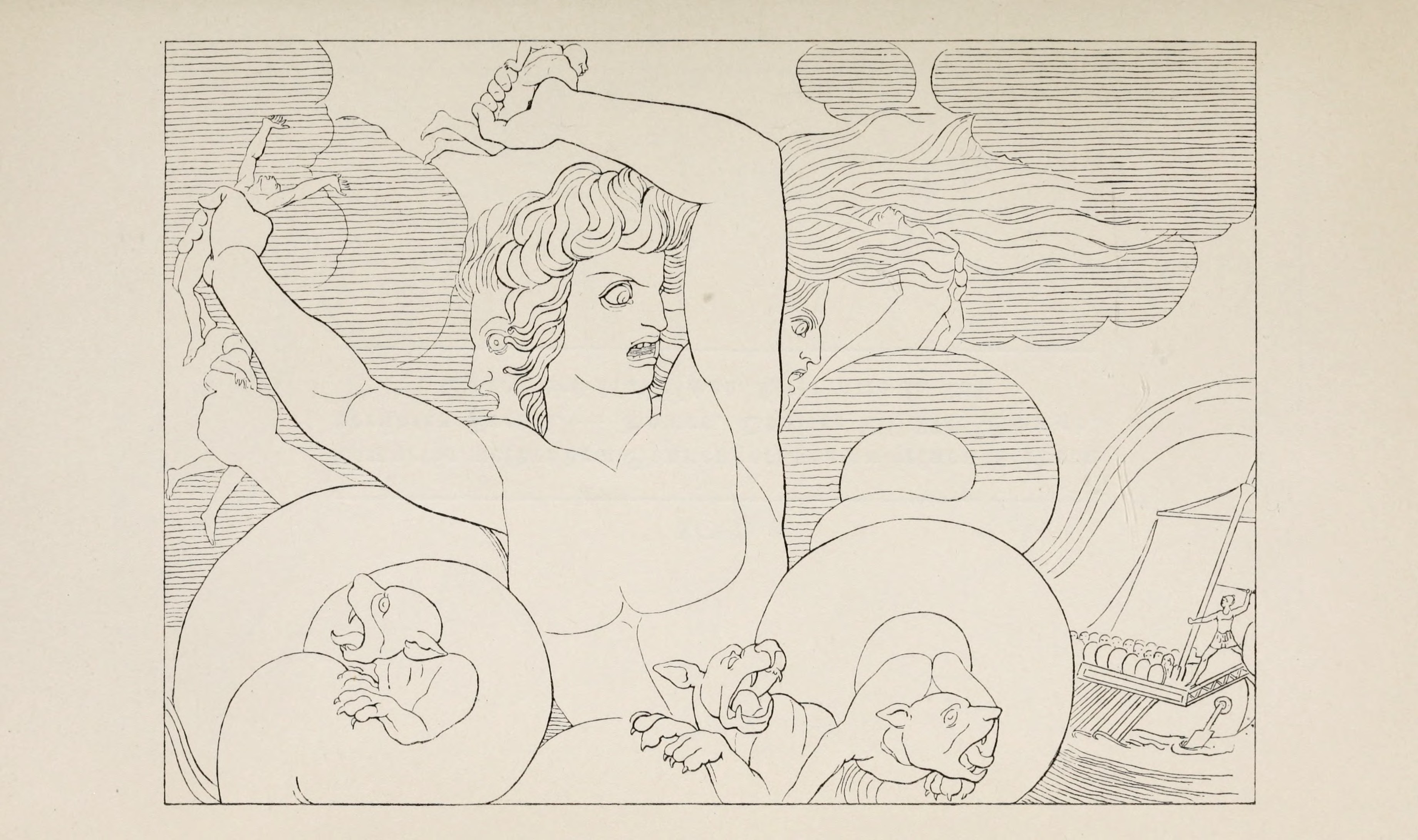 Skylla und Charybdis. – Homer, Odyssee XII. 245. Schwab, Sagen des klassischen Altertums II. 282.